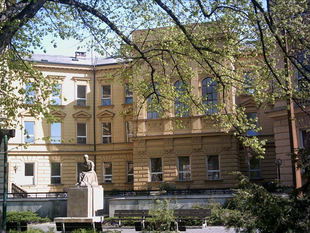 Gymnázium Boženy Němcové